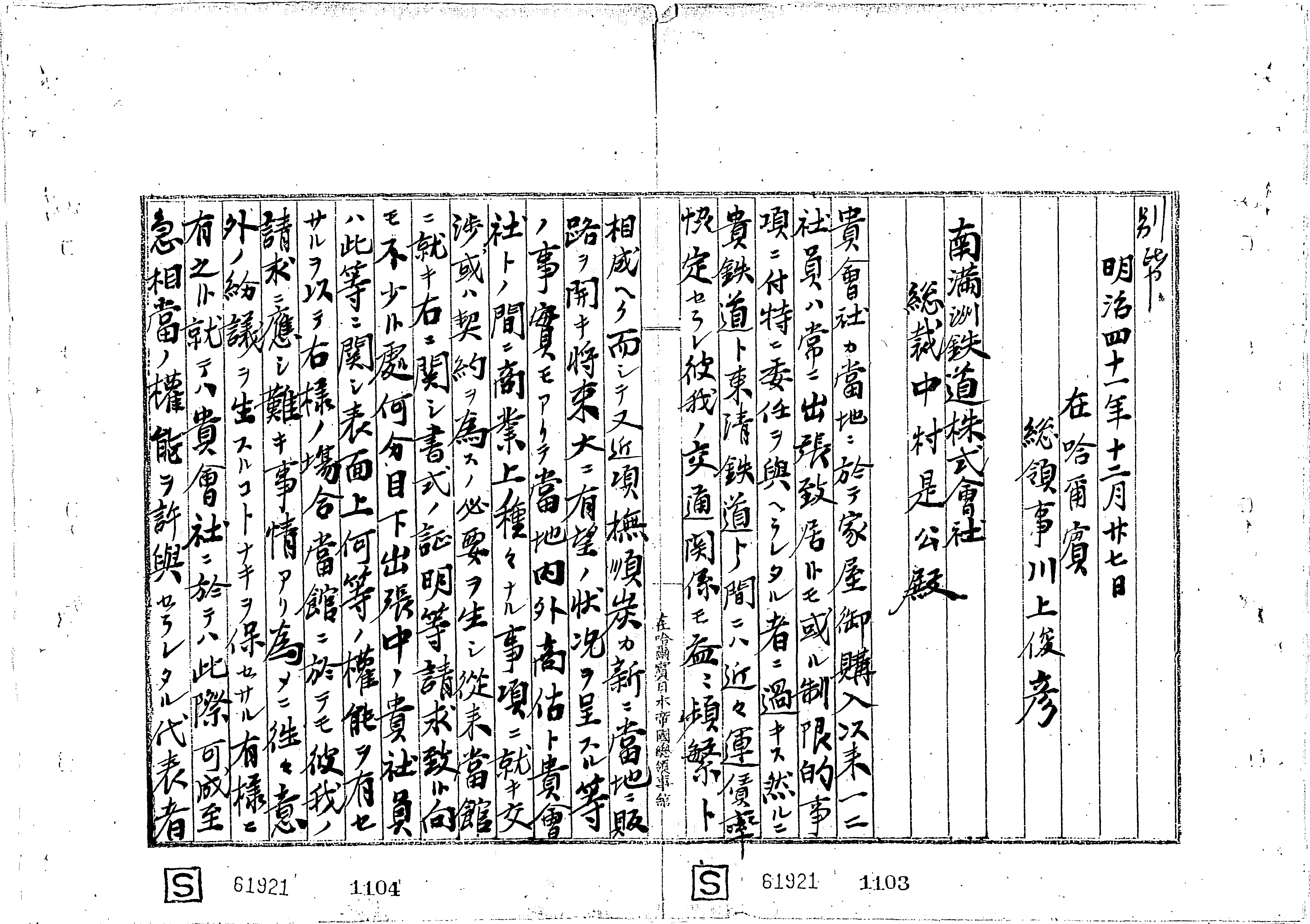 国立公文書館 アジア歴史資料センター「南満洲鉄道株式会社関係資料」